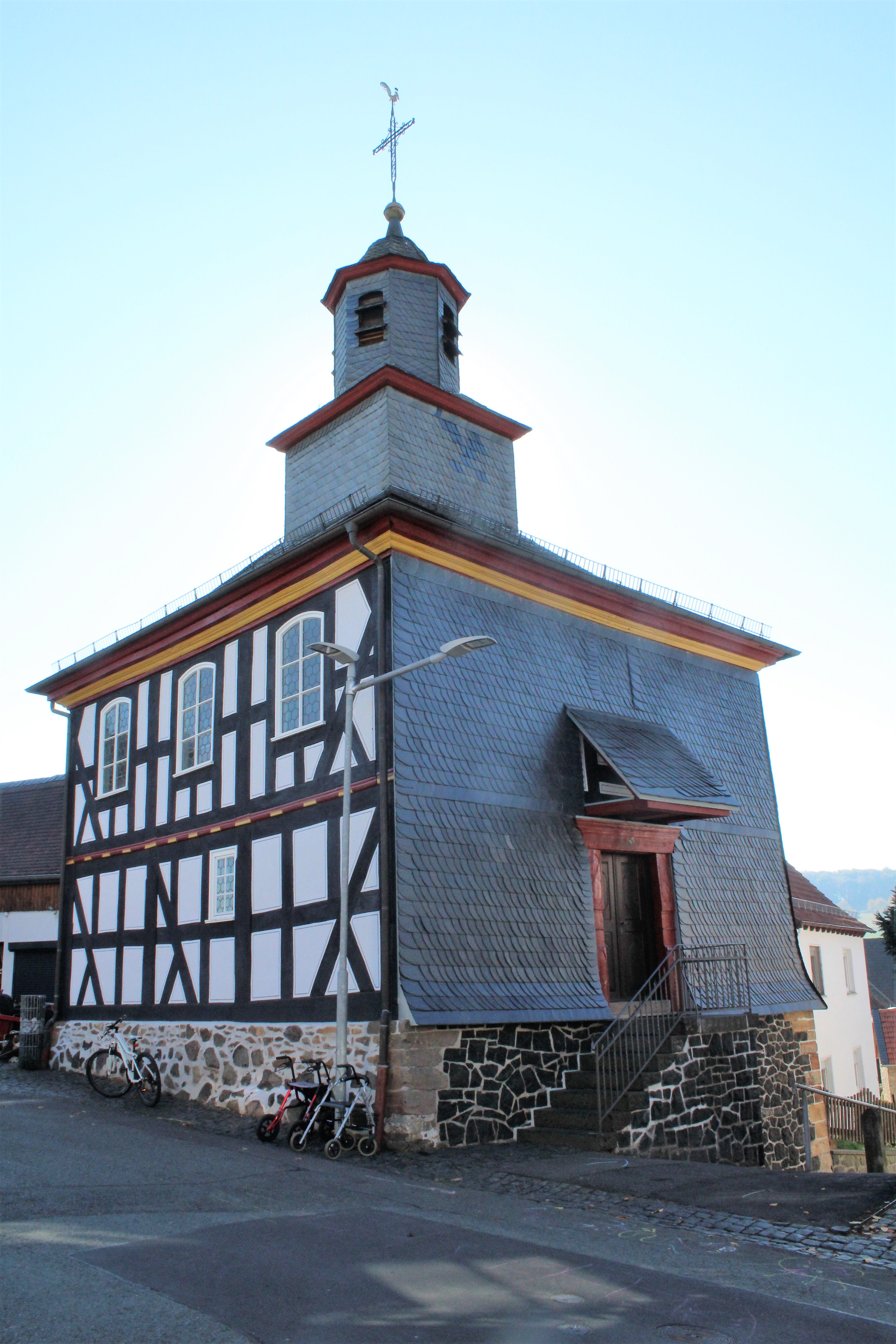 Evangelische Kirche Runzhausen (Gladenbach), Landkreis Marburg-Biedenkopf, Hessen, Deutschland